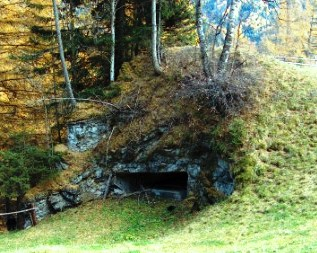 opera 14 tenne